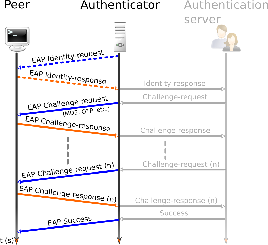 Schéma d'authentification EAP sur PPP (Principe)